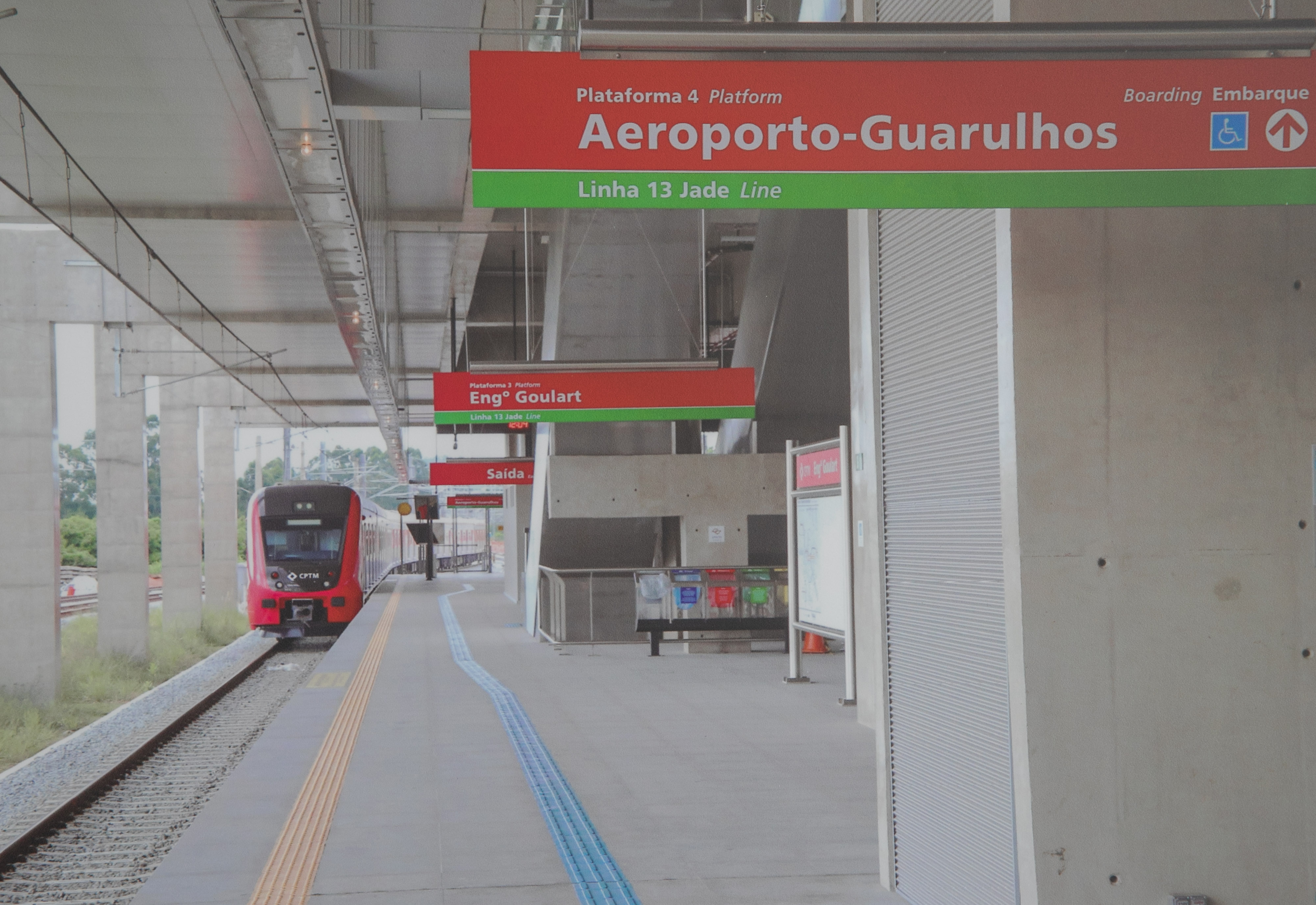 O governador do Estado de São Paulo, Geraldo Alckmin, entrega linha 13 Jade da CPTM em Guarulhos. Local: Guarulhos/ SP Data: 31/03/2018 Foto: Governo do Estado de São Paulo